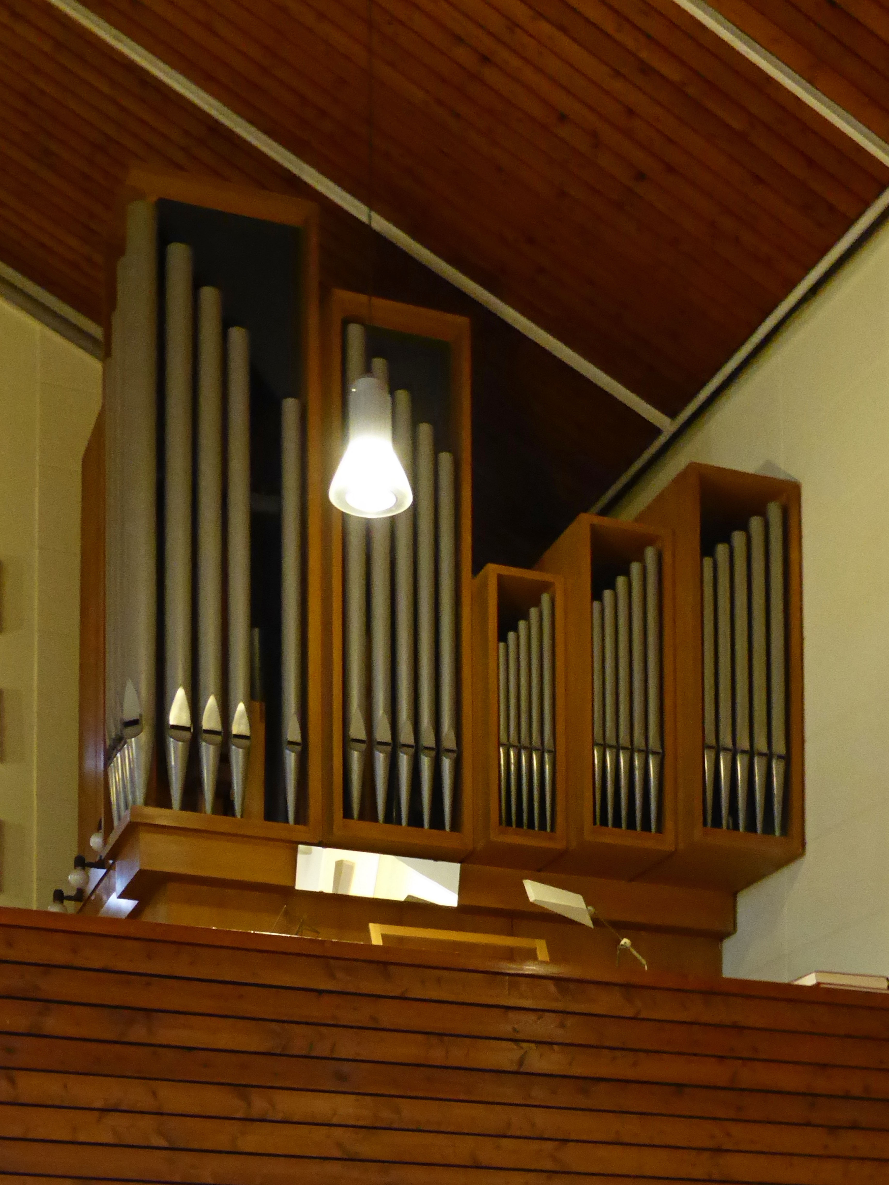 Orgel der katholischen St.-Martin-Kirche in Osterode am Harz.